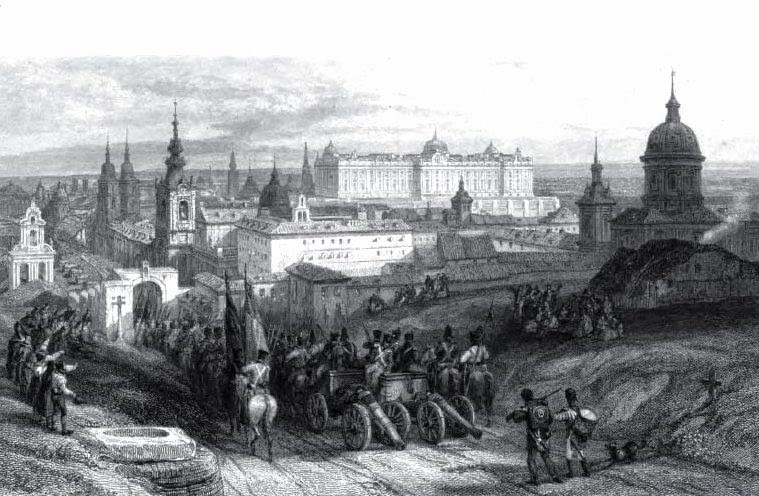 Antigua puerta del camino de Fuencarral, en la cerca de la villa de Madrid, al final de lo que entonces fuera la carrera o camino de San Bernardo (hoy calle de San Bernardo). Grabado de la obra "Spanish Sketches" del pintor romántico y dibujante de origen escocés David Roberts (1796-1864), que recorrió España entre 1832 y 1833.